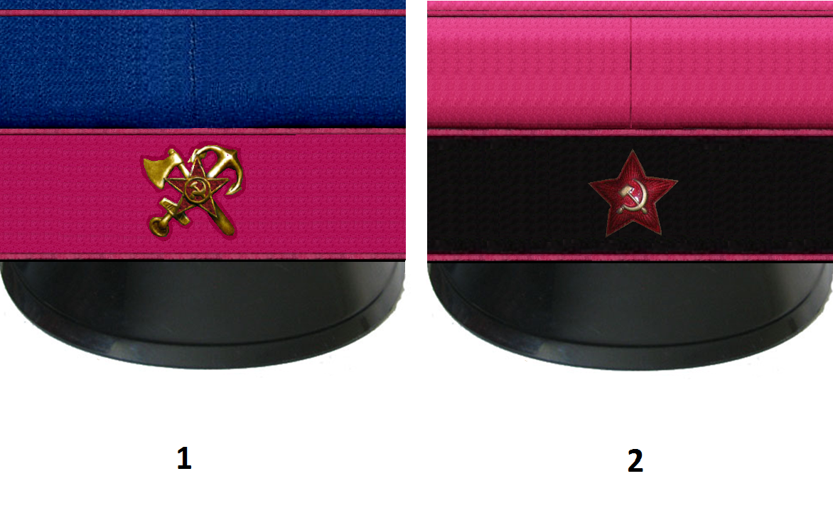 Фуражки ГПУ24